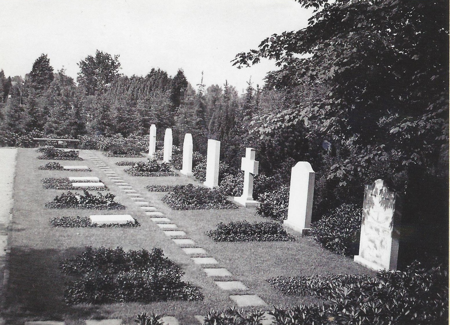 Musterfriedhofsanlage auf dem Geestemünder Friedhof